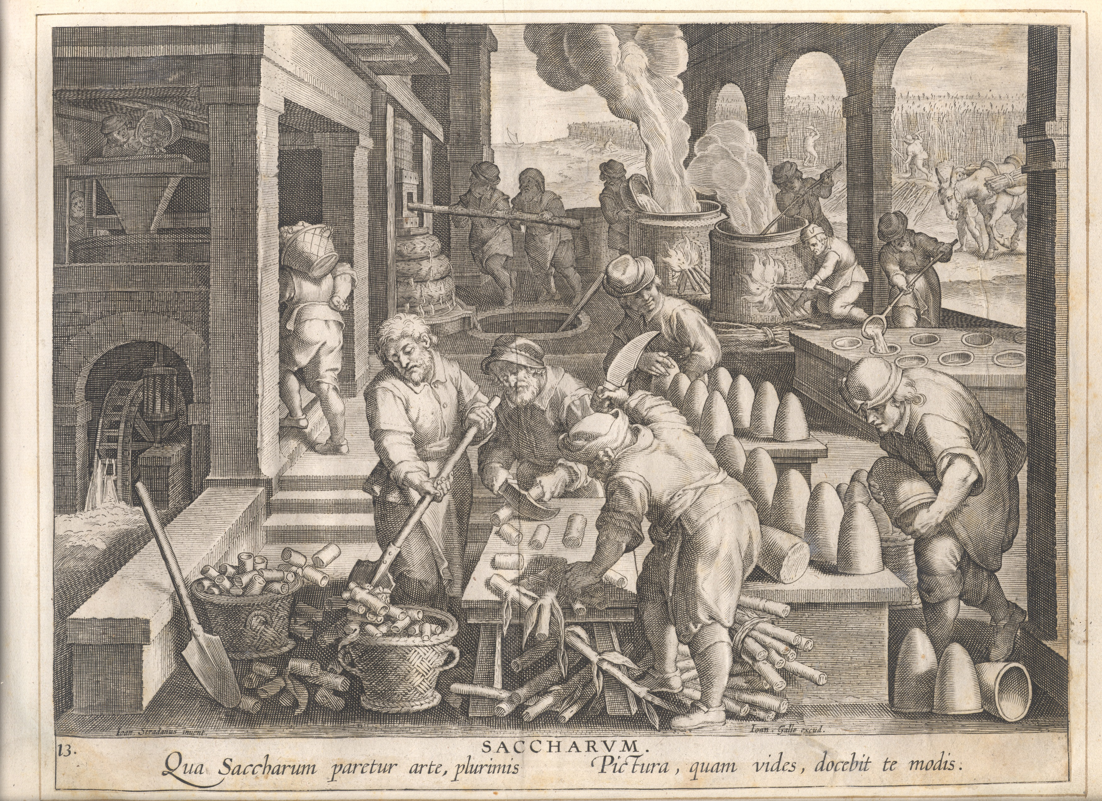 anonymous: The invention of sugar refinery Artist anonymousDesigner Stradanus (1523–1605) Alternative names Jan van der Straet, Giovanni della Strada, Johannes della Strada, Giovanni Stradano, Johannes Stradano, Giovanni Stradanus, Johannes Stradanus, Jan van Straeten, Jan van StratenDescriptionFlemish painter and draughtsmanDate of birth/death 1523 2 November 1605 Location of birth/death Bruges FlorenceWork location Antwerp (1545), Florence (circa 1550-1605), Rome (circa 1550-1553), Montemurlo (1590)Authority control : Q143595 VIAF: 29699451 ISNI: 0000 0000 8108 906X ULAN: 500011304 LCCN: n84804240 NLA: 35875335 WorldCat creator QS:P170,Q143595 Title De uitvinding van de suikerraffinaderijPublisher Jan Galle Object type engraving Description Gravure , anoniem, Museum Plantin-MoretusMedium gravureCollection Museum Plantin-Moretus Native nameMuseum Plantin-MoretusLocationAntwerpCoordinates51° 13′ 05.86″ N, 4° 23′ 53.39″ E Established1877 Web page control : Q595802 VIAF: 130668175 ISNI: 0000 0001 2285 9666 LCCN: n50051109 UNESCO: 1185 GND: 1007736-4 WorldCat institution QS:P195,Q595802Accession number PK OPB 0186 014References described at URL: Source/Photographer Museum Plantin-Moretus Native nameMuseum Plantin-MoretusLocationAntwerpCoordinates51° 13′ 05.86″ N, 4° 23′ 53.39″ E Established1877 Web page control : Q595802 VIAF: 130668175 ISNI: 0000 0001 2285 9666 LCCN: n50051109 UNESCO: 1185 GND: 1007736-4 WorldCat institution QS:P195,Q595802Permission(Reusing this file) This file is made available under the Creative Commons CC0 1.0 Universal Public Domain Dedication. The person who associated a work with this deed has dedicated the work to the public domain by waiving all of their rights to the work worldwide under copyright law, including all related and neighboring rights, to the extent allowed by law. You can copy, modify, distribute and perform the work, even for commercial purposes, all without asking permission. Gravure , anoniem, Museum Plantin-Moretus